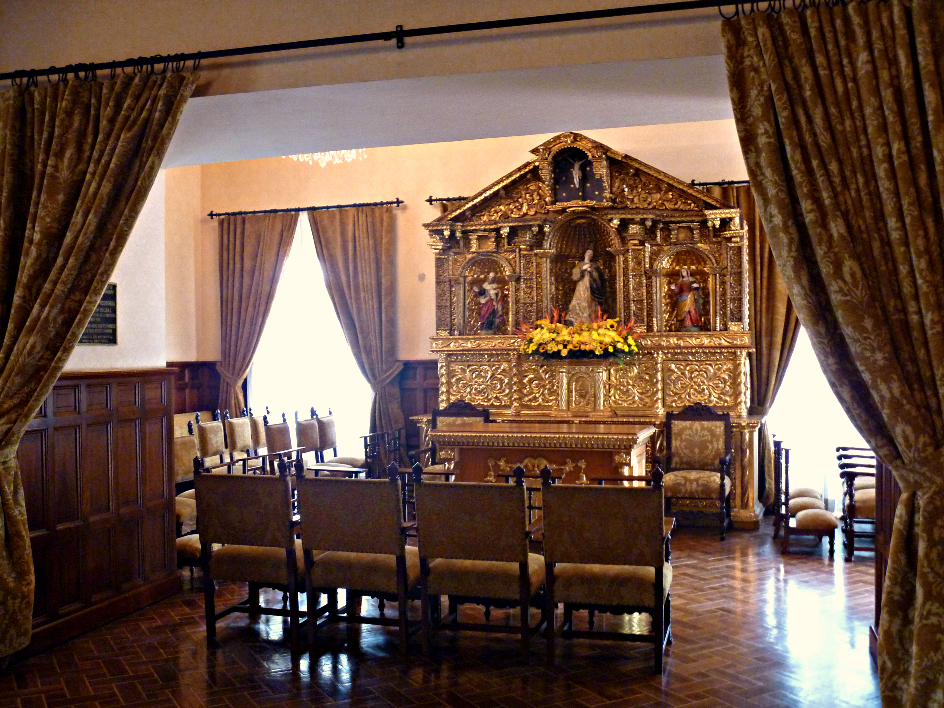 Oratorio del Palacio de Carondelet, ubicado donde antes se encontraba el área para fumar del Salón de Banquetes - Quito DM.